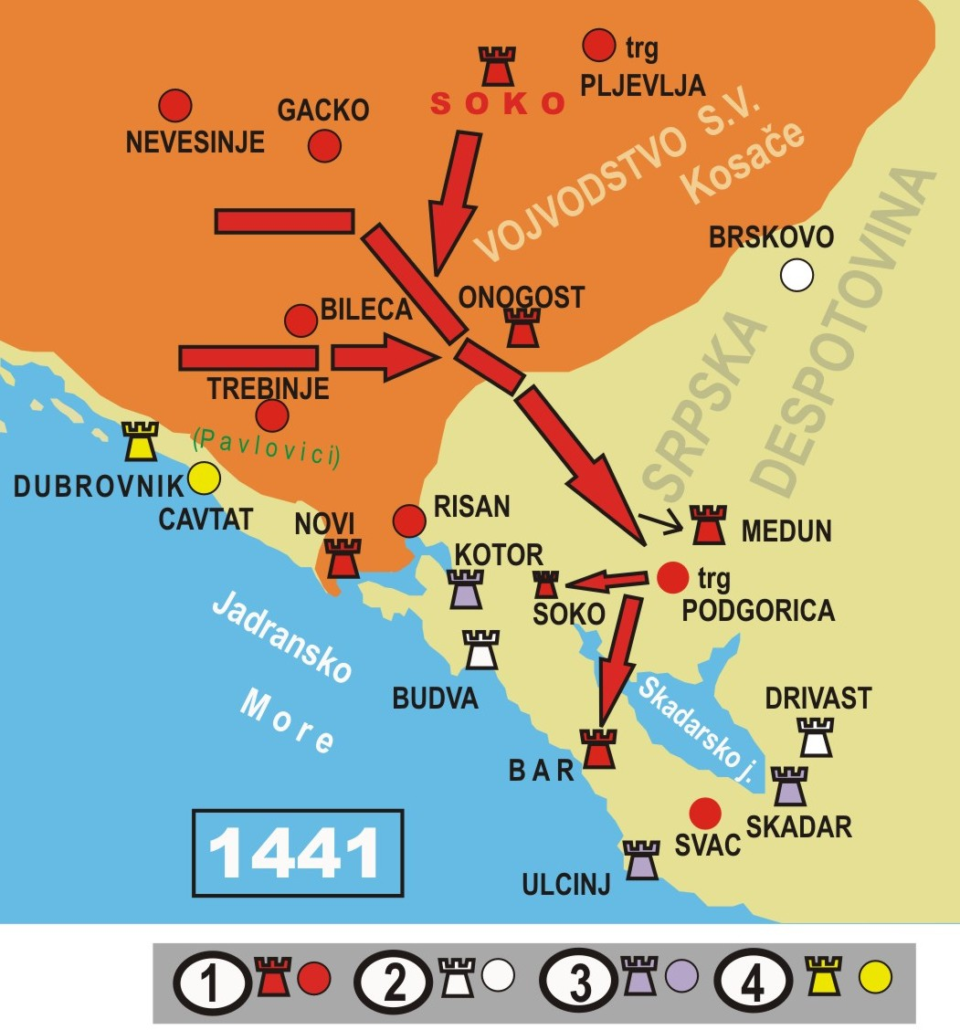 Ratom u Zeti (1441) Vojodstvu Stefana Vukčića Kosače pripojena je Gornja Zeta. Osvojen je grad Bar, sa tvrđavom (danas Stari Bar) u Donjoj Zeti, Svač i okolina primorskih gradova. Posjedi: 1. osvojeni od Stefana V. Kosače; 2. Srpske despotovine; 3. Mlečana; 4. Dubrovačke republike. (Извор: Редакција за историју ЦГ –„Историја Црне Горе“, књига II-2, Титоград, 1970.)